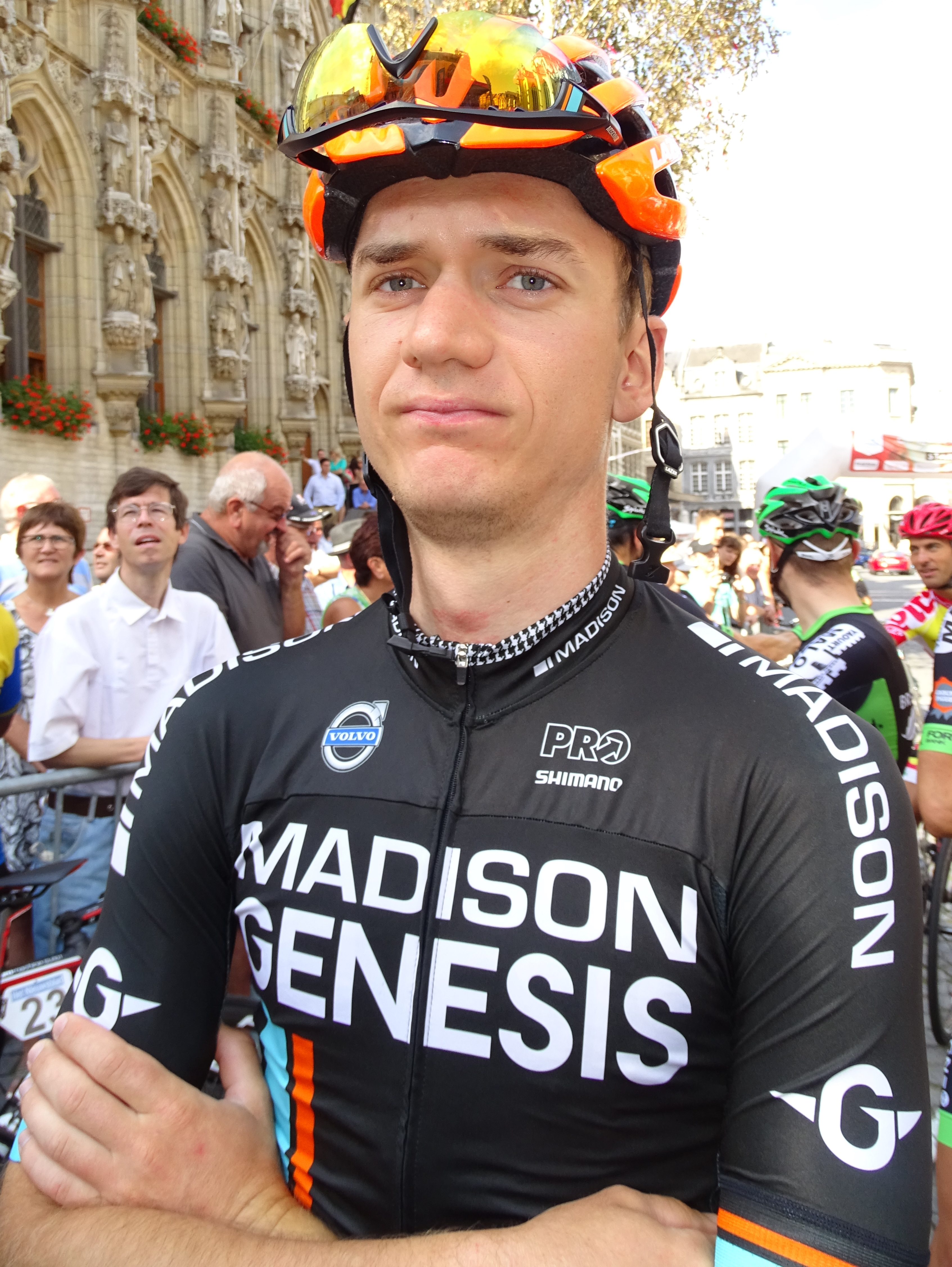 Reportage réalisé le dimanche 23 août à l'occasion du départ et de l'arrivée du Grand Prix Jef Scherens 2015 à Louvain, Belgique.